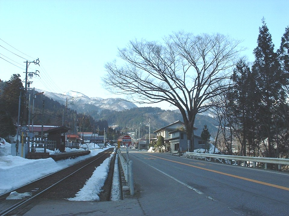 白山長滝駅（左）と国道156号（右）